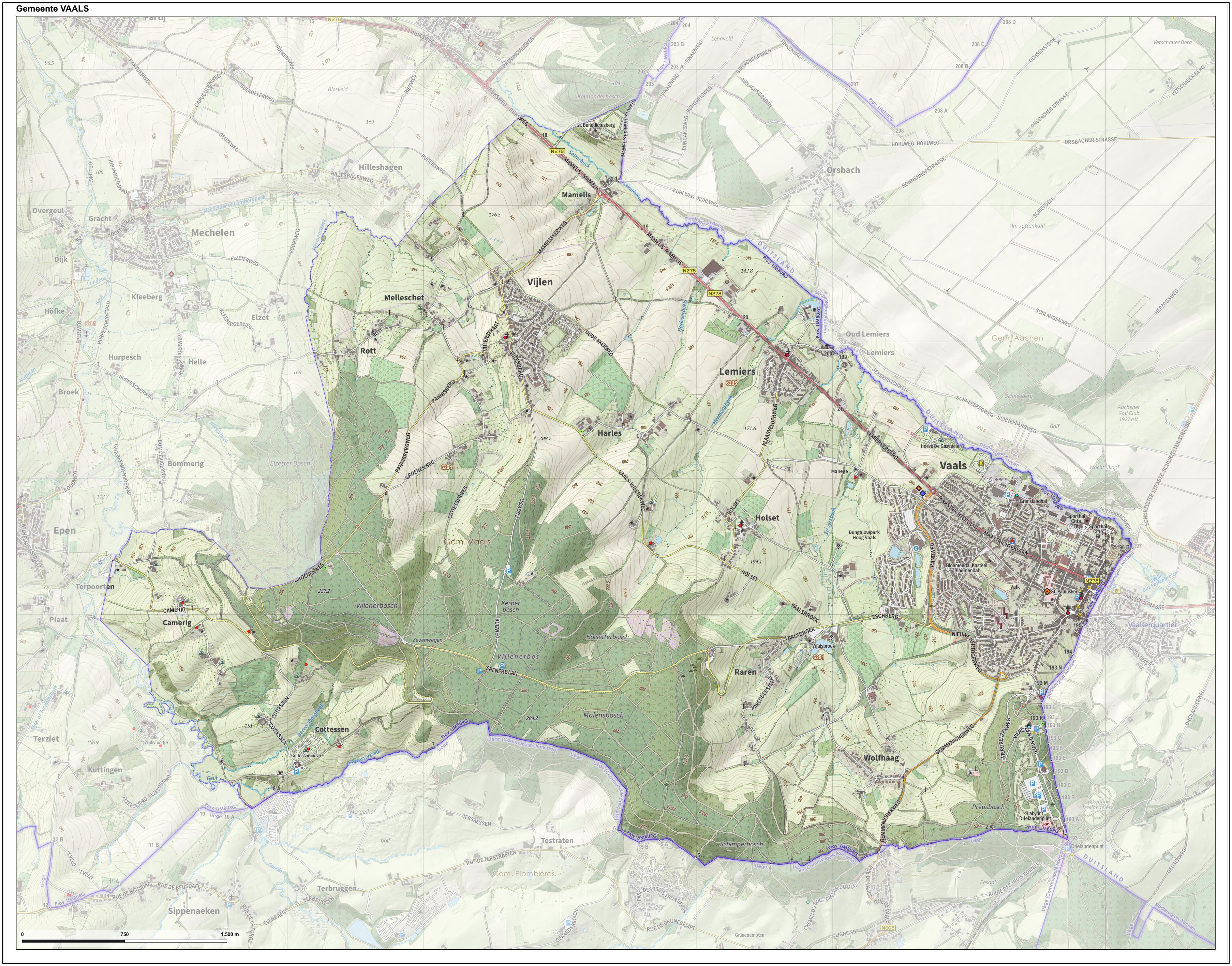 Topografische gemeentekaart. Resolutie: 400 pixels/km. Kaartbeeld samengesteld uit de open geodata van de Top10NL en Top25namen (Kadaster), Creative Commons-BY licentie. Gebouwvlakken uit open geodata BAG extract. Wegen uit de OpenStreetMap, OpenStreetMap community. Reliëfschaduw uit de Actuele Hoogtekaart AHN2. Samenstelling en kleurenschema: Jan-Willem van Aalst, met QGIS. Zie ook de Legenda.